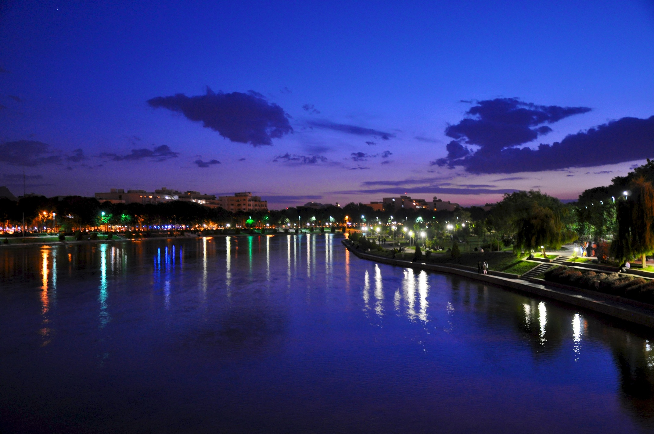 Zayandehroud after sunset, Isfahan, Iran